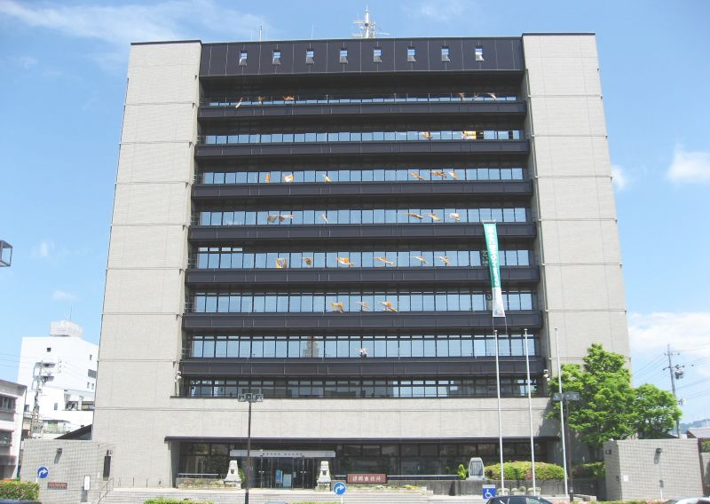 Shimizu-ku Ward Office, Shizuoka